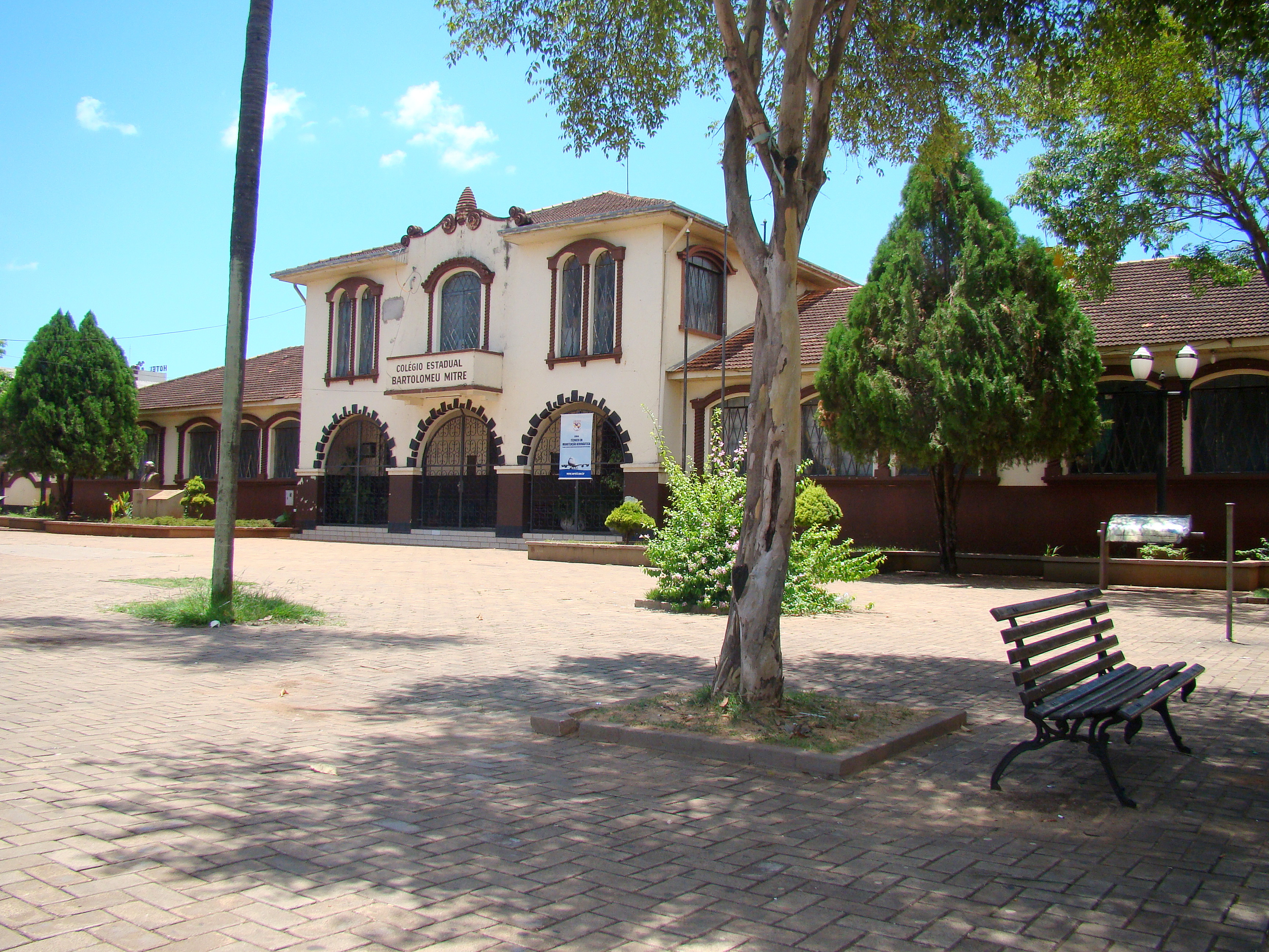 Colégio Estadual Bartolomeu Mitre em Foz do Iguaçu, Paraná, Sul do Brasil. Construção de 1927.